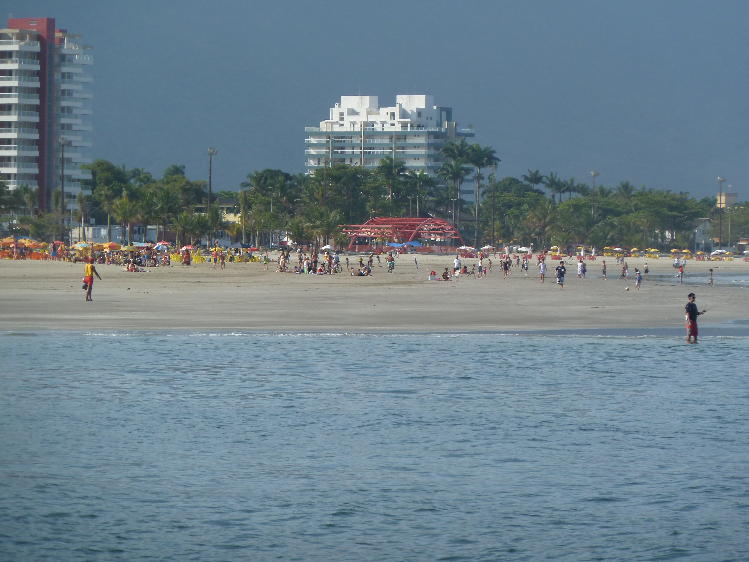 Bertioga, SP, Brasil. Praia Da Enseada, vista do mar.